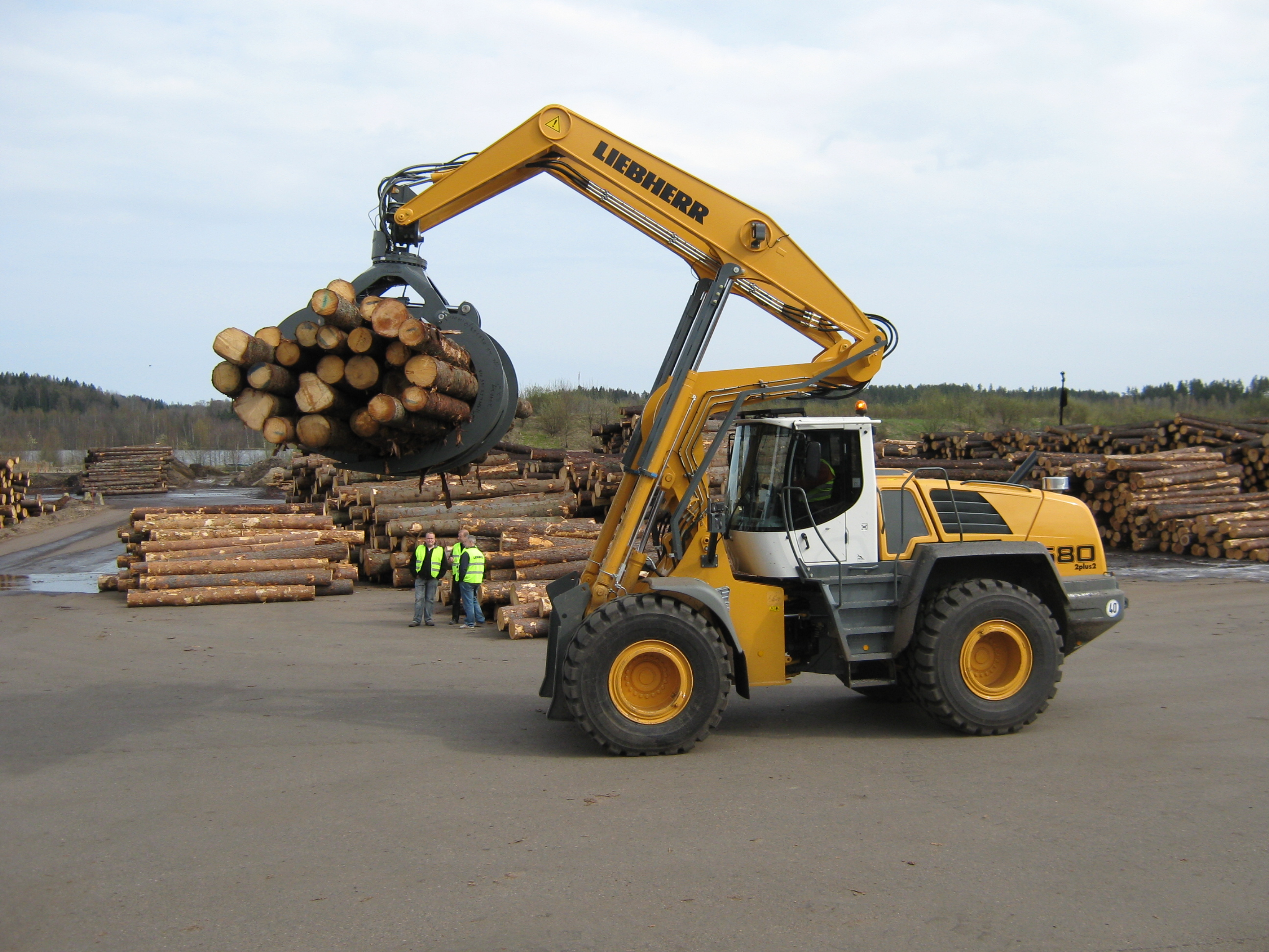 Liebherr-Radlader L 580 2plus2 LogHandler beim Holzumschlag.